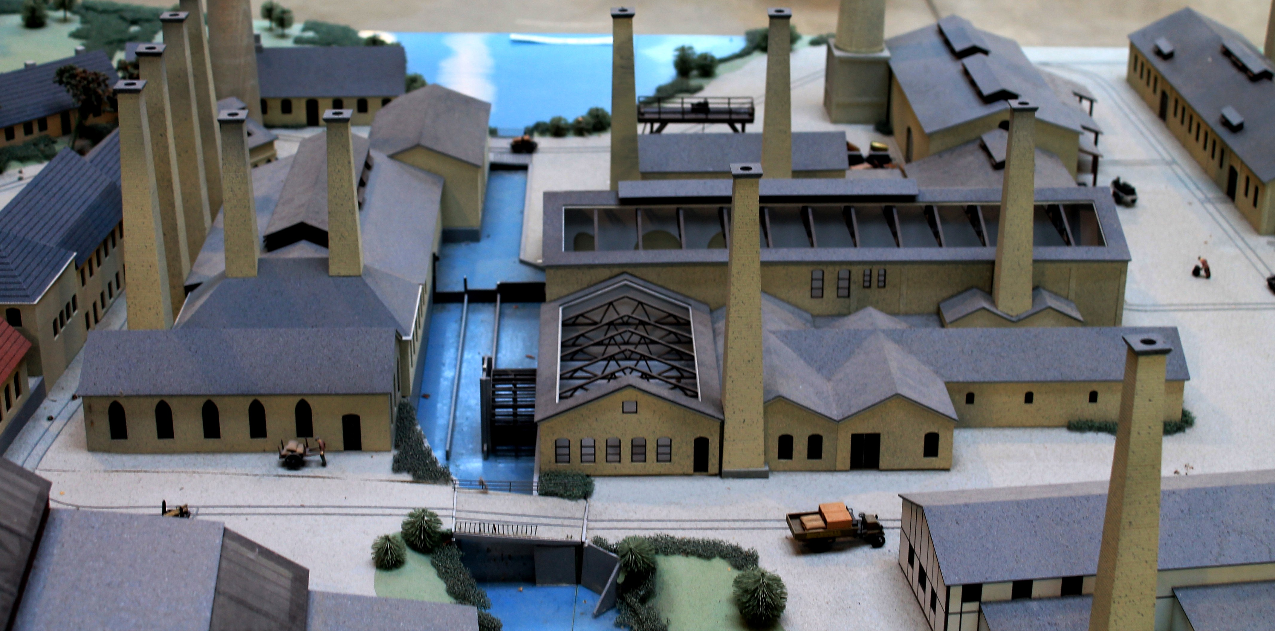 Modell der Kupfermühle mit Blick auf das Wasserrad im Industriemeseum Kupfermühle